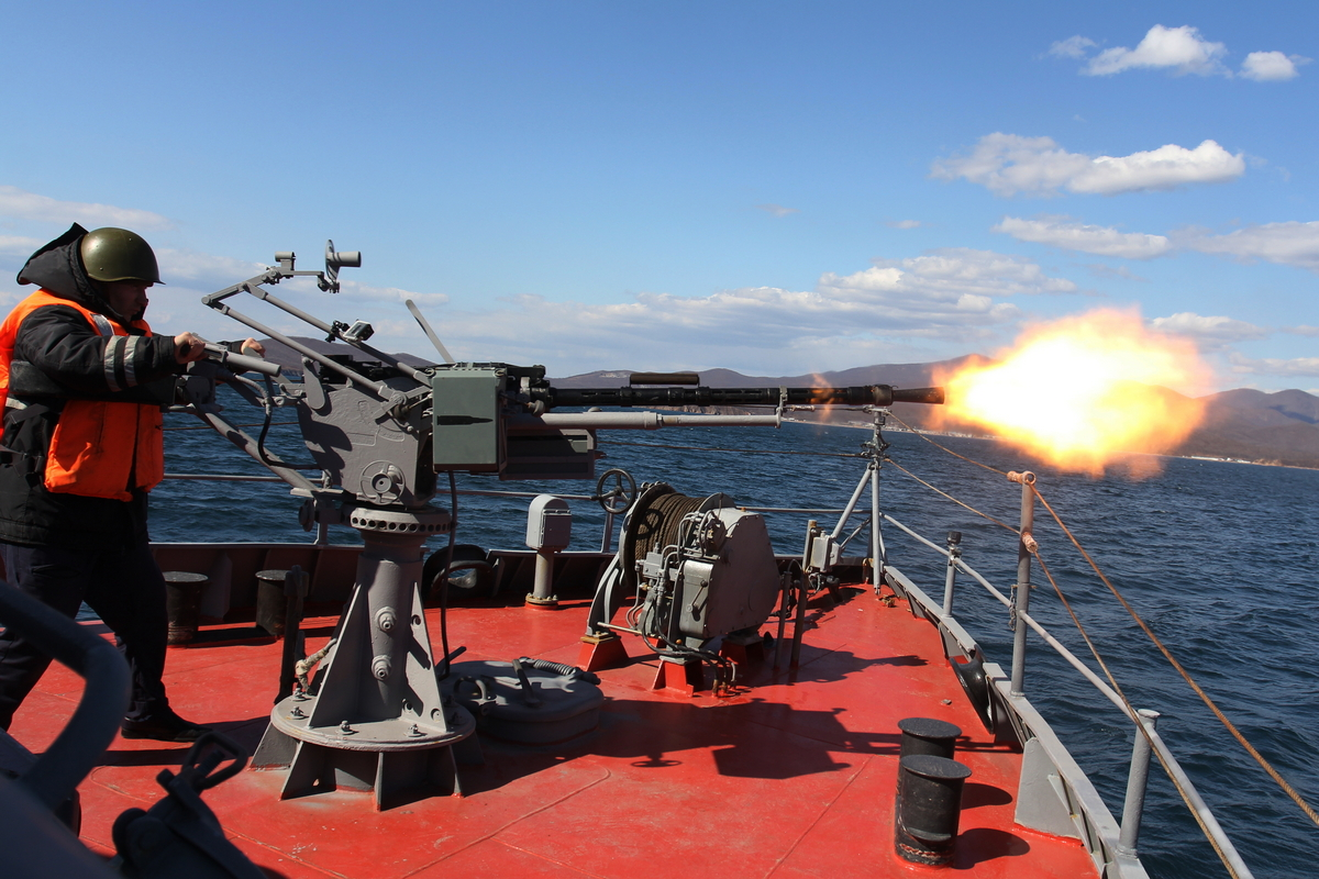 Тихоокеанский флот отмечает 288-ю годовщину со дня образования